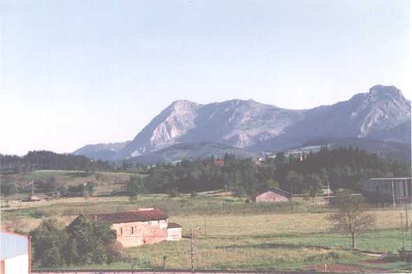 Vista de la crestería del Amboto por la cara norte. Vista el cresterío del Anboto (duranguesado)Vizcaya, País Vaco, España.